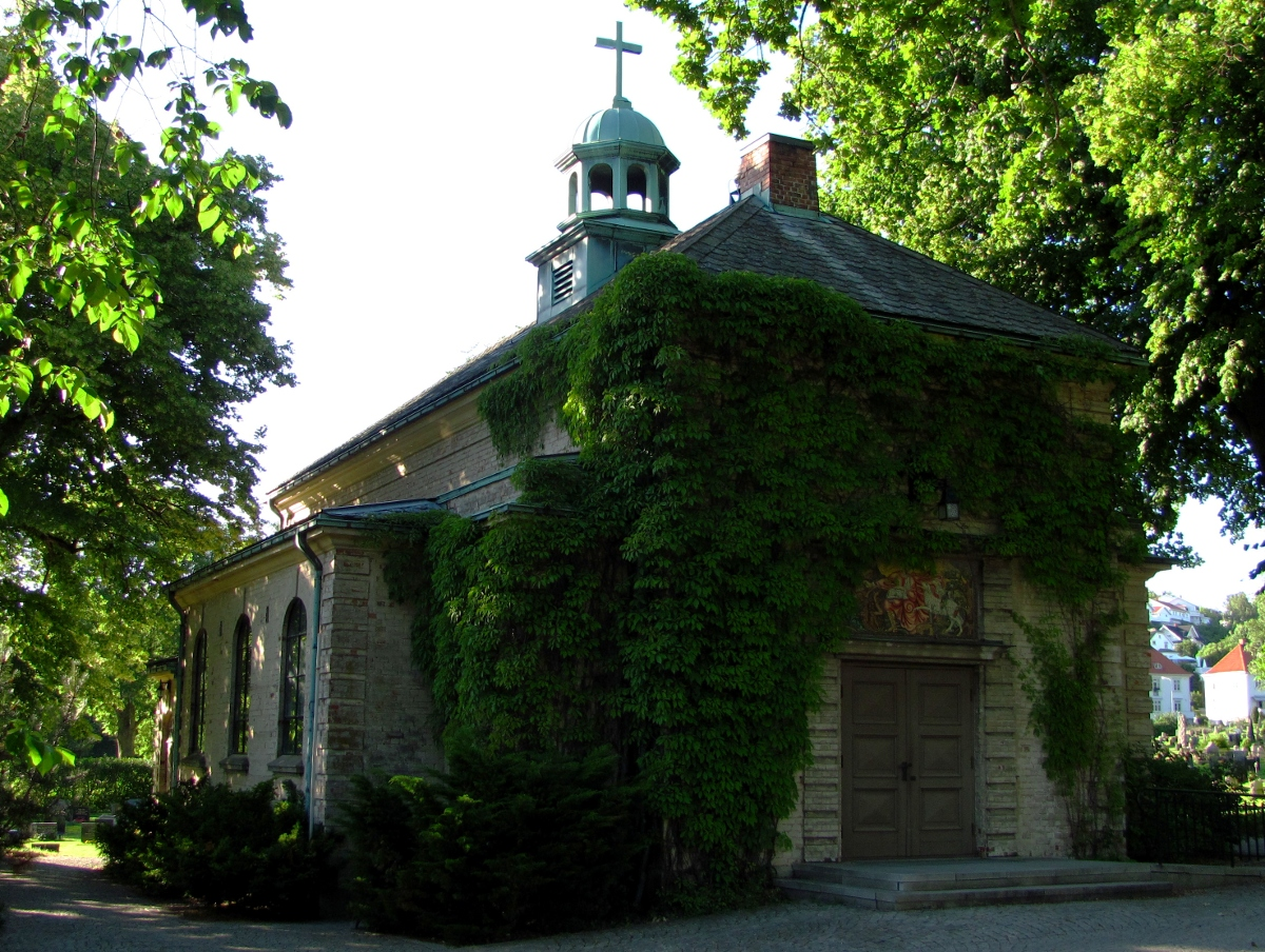 Inngangen til Os gravkapell i Halden, Østfold, med en frise av Per Vigeland over døren.